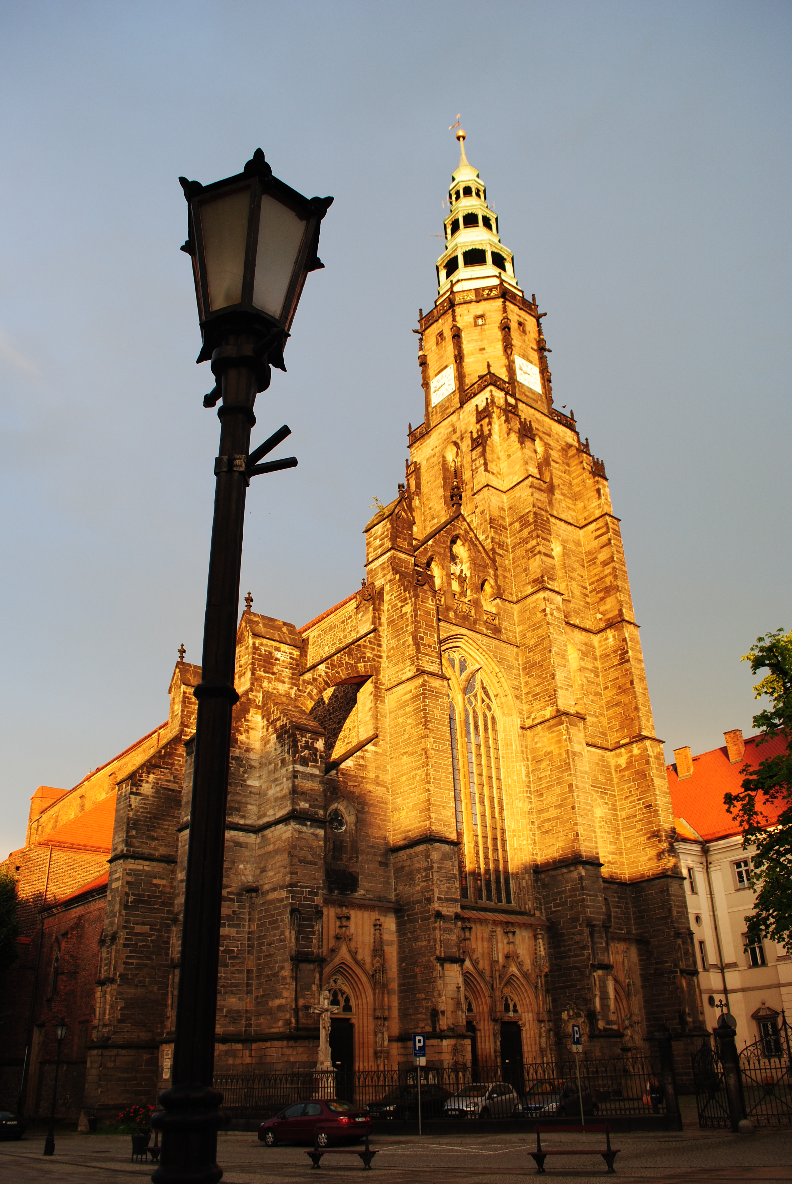 Świdnica, pl. Jana Pawła II - kościół farny, nast. Jezuitów, ob. kościół katedralny, parafialny p.w. św. Stanisława i Wacława (zabytek nr rejestr. A/1676/77 29.03.1949)